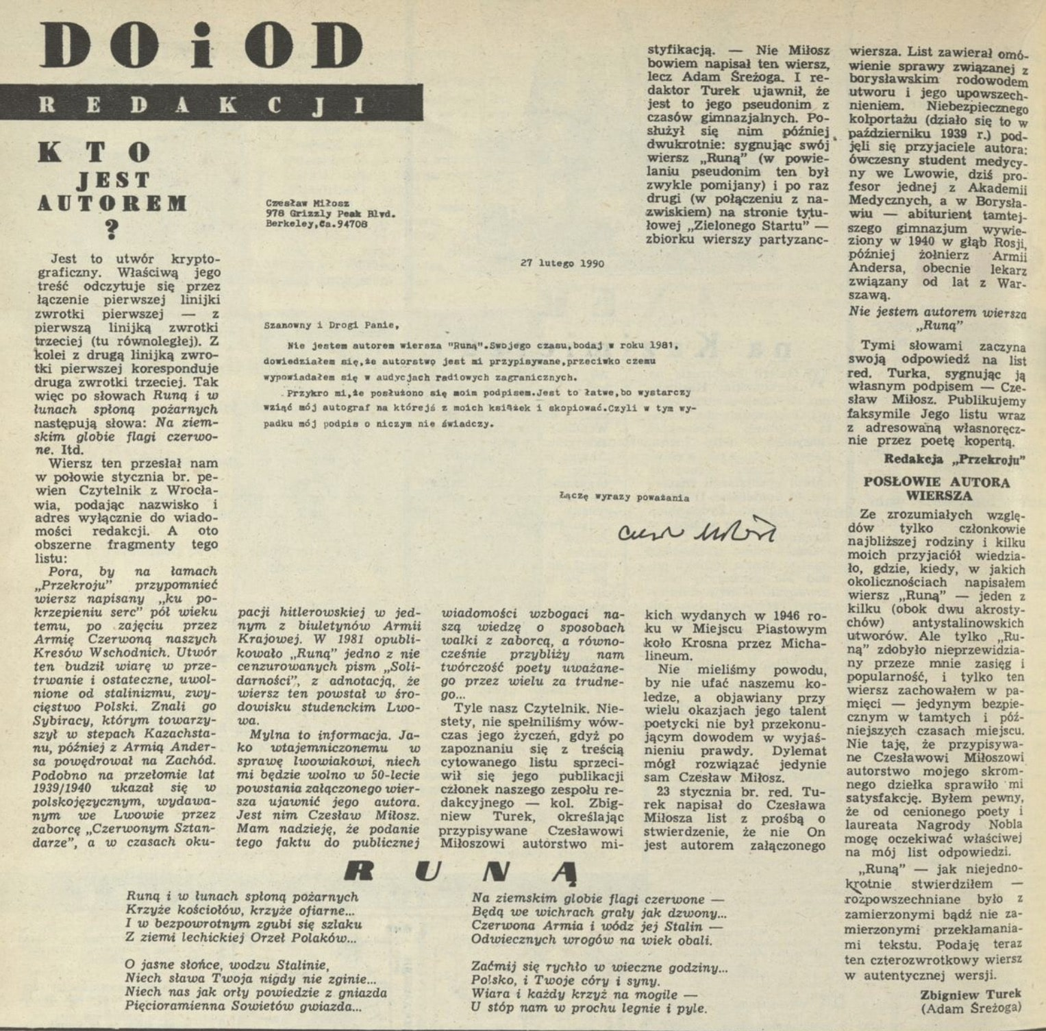 Wiersz „Runą” Zbigniewa Turka na łamach Przekroju z 1990 roku. „Od i do redakcji", w którym zawarte jest oświadczenie Czesława Miłosza o nie byciu autorem wiersza, oraz przyznanie się Zbigniewa Turka do jego autorstwa.